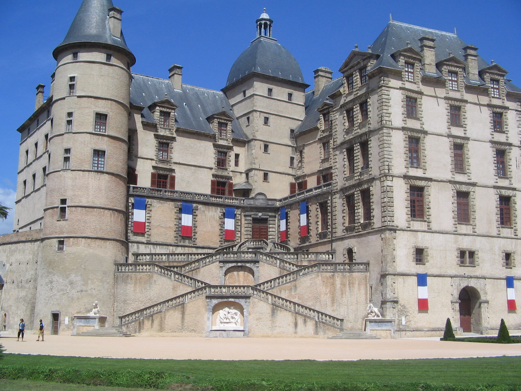 Château de Vizille, Isère, France.